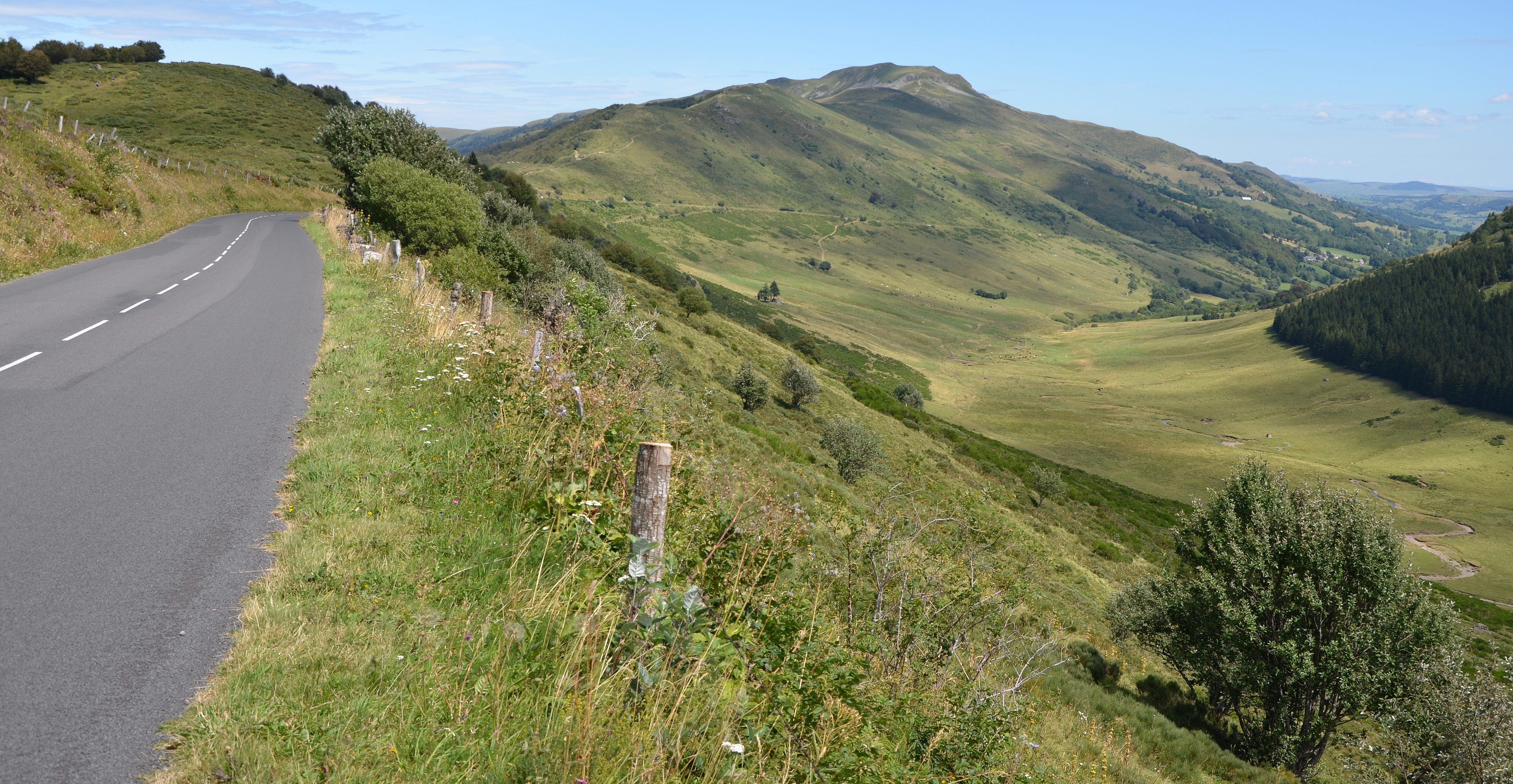 Vallée de l'Impradine et Puy de Niermont (1620 m) , Cantal, France